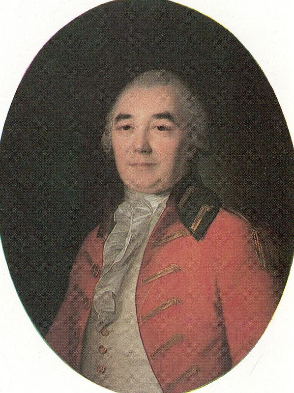 По малоубедительной атрибуции В. Старка, изображен Алексей Иванович Горчаков (15.05.1737 - 1805).